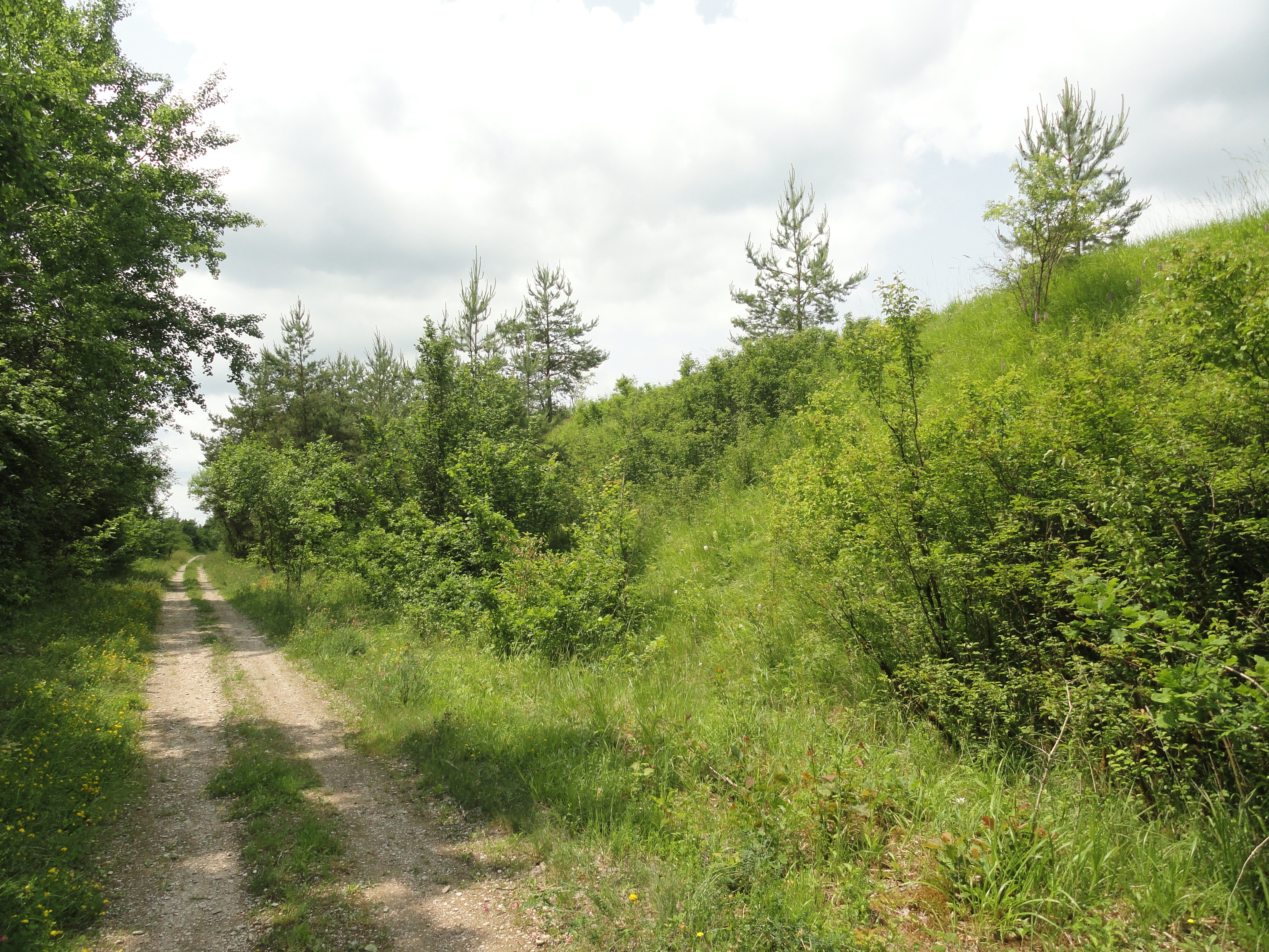 Un chemin à Huiron, compris dans la ZNIEFF Pelouses des talus de l'ancienne voie ferrée de Huiron à Sompuis.